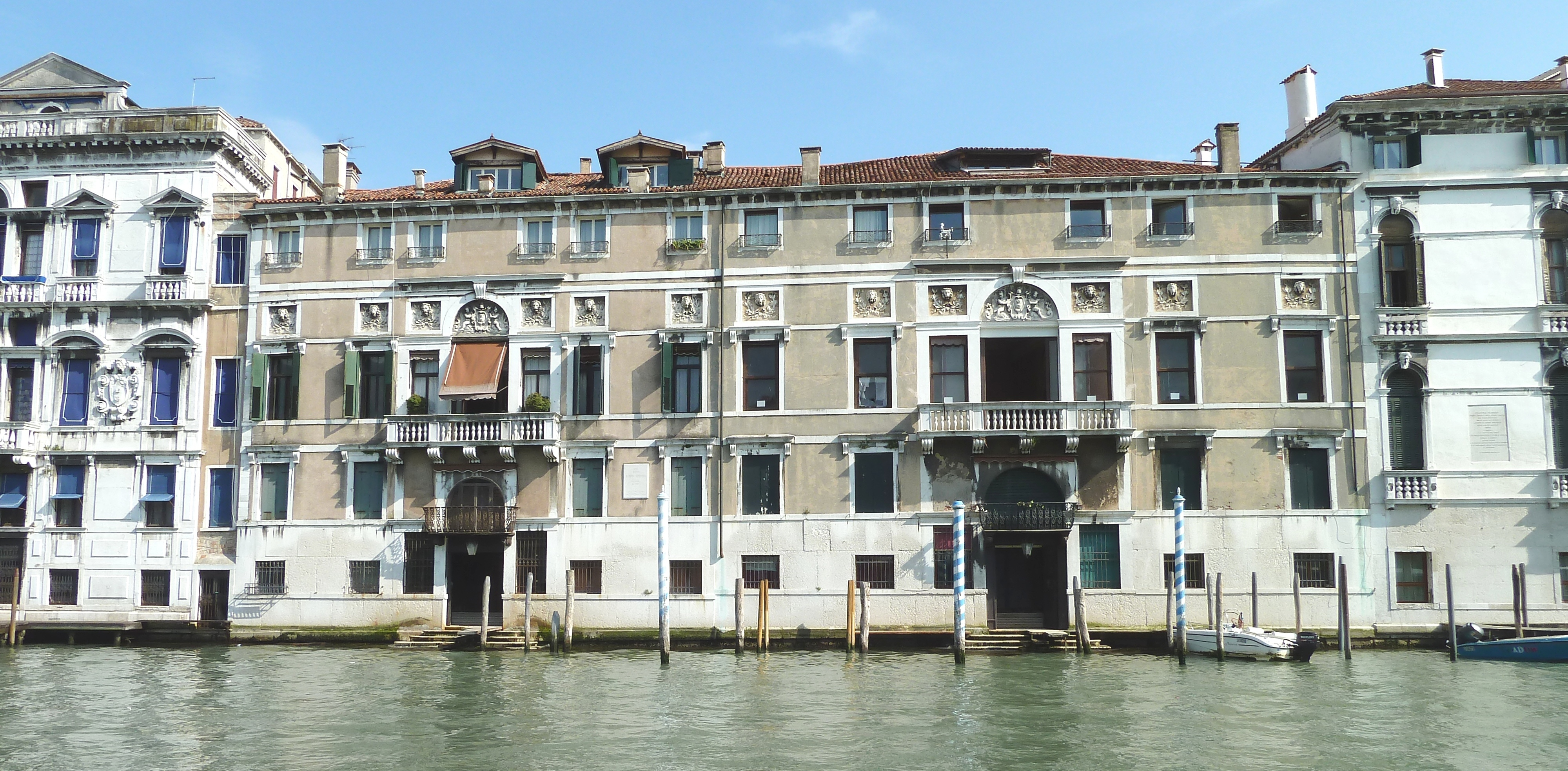 Pal Mocenigo